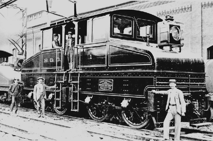 B & O electric locomotive